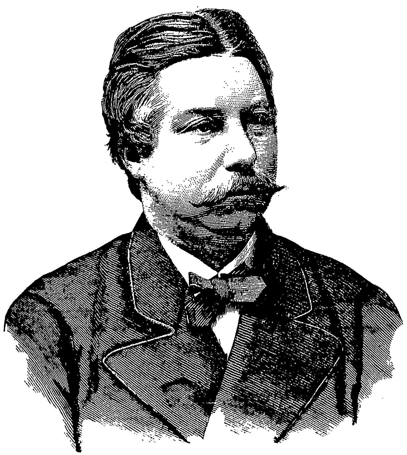 Norsk (bokmål): Sangeren Thorvald Lammers.